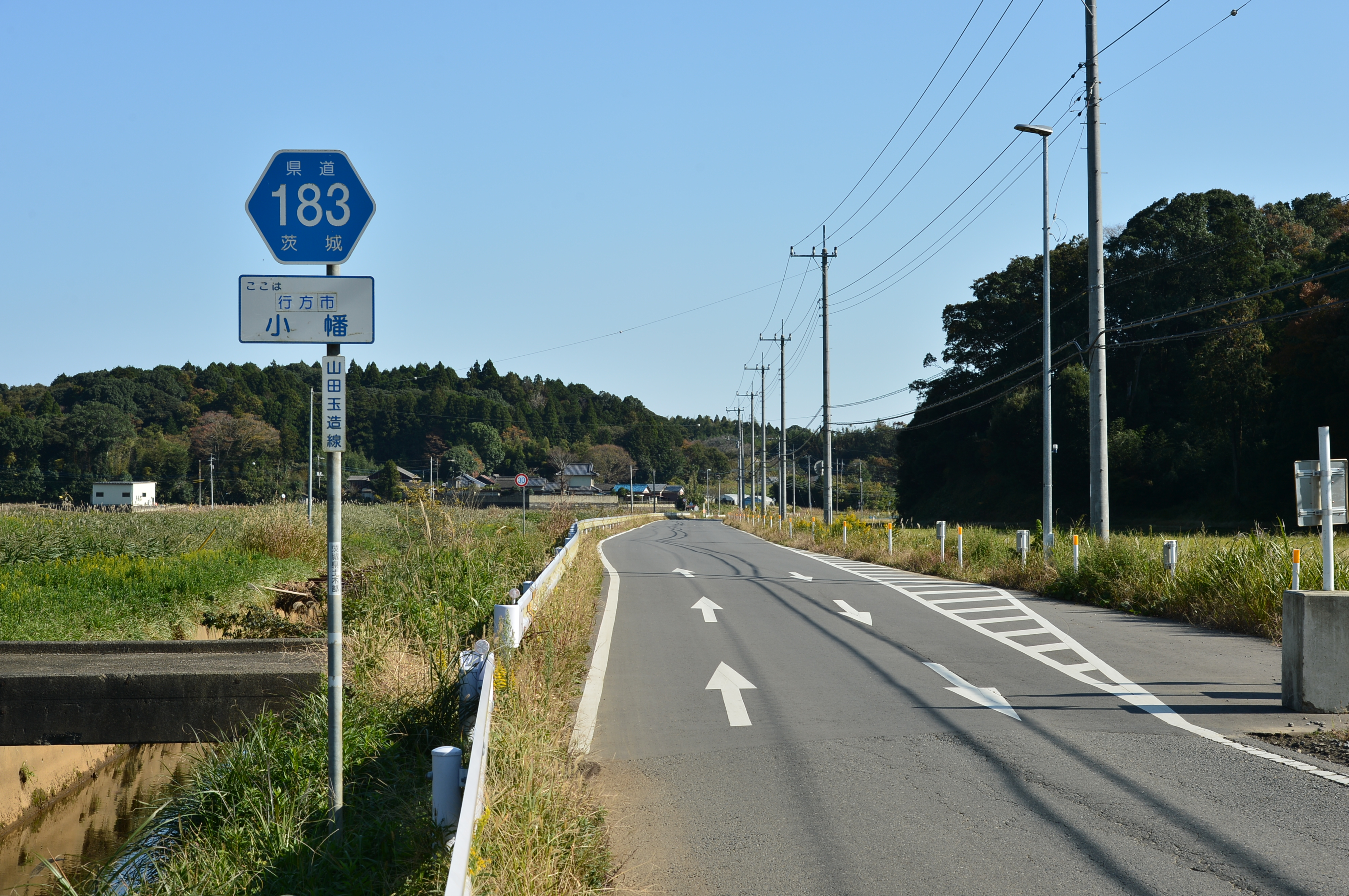 茨城県道183号山田玉造線（行方市小幡）。茨城県道184号島並鉾田線との交差点付近から山田方面に向けて撮影。